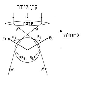 תרשים 6: בדיאגראמה רואים חלקיק אשר מוחזק ע"י אותם הכוחות אשר תיארנו מקודם, כאשר ההבדל נובע בעדשה החזקה אשר ממקדת את האור בצורה טובה וחזקה יותר, כאשר החלקיק יכול להיות גדול או קטן יותר מאורך הגל.